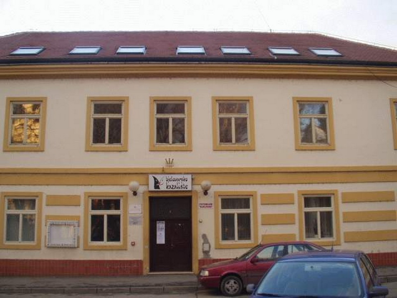 Bjelovar - Theatre